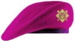 Новий зразок берета українського Президентського полку